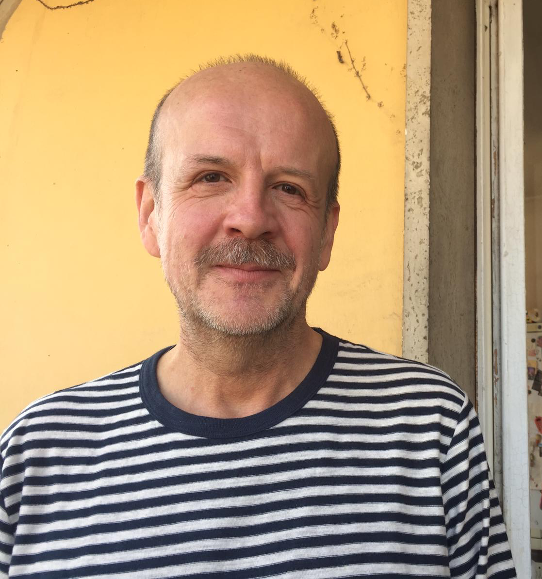 L'attore e doppiatore Roberto Accornero in una foto scattata dalla figlia Angelica